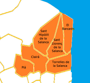 Mapa del Cantó de la Costa Salanquesa elaborat a partir d'un mapa de lliure disposició